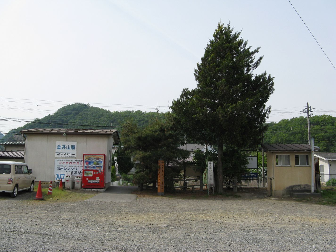 長野電鉄屋代線 金井山駅